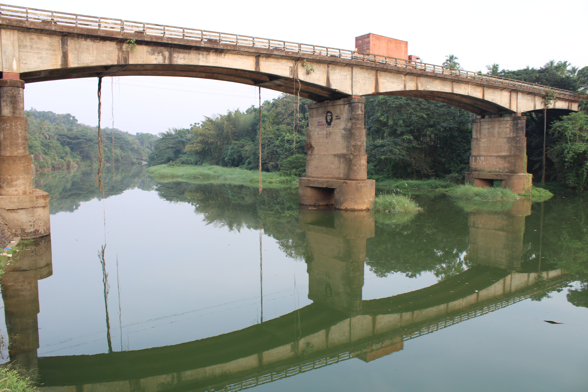 ആനക്കയം പാലത്തിന്റെ താഴെ നിന്നുള്ള ഒരു കാഴ്ച.